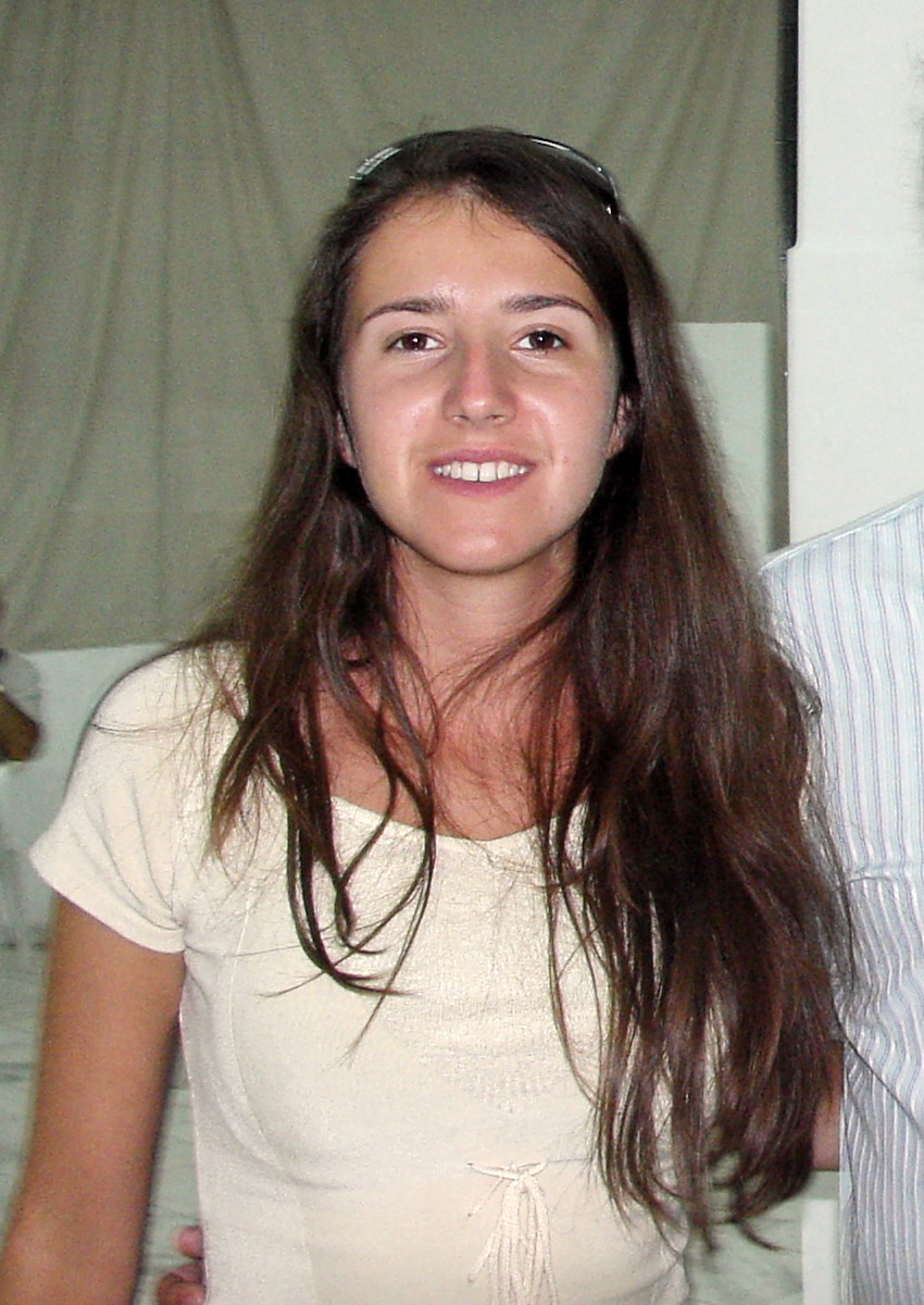 Iva Videnova (Bulgaria)